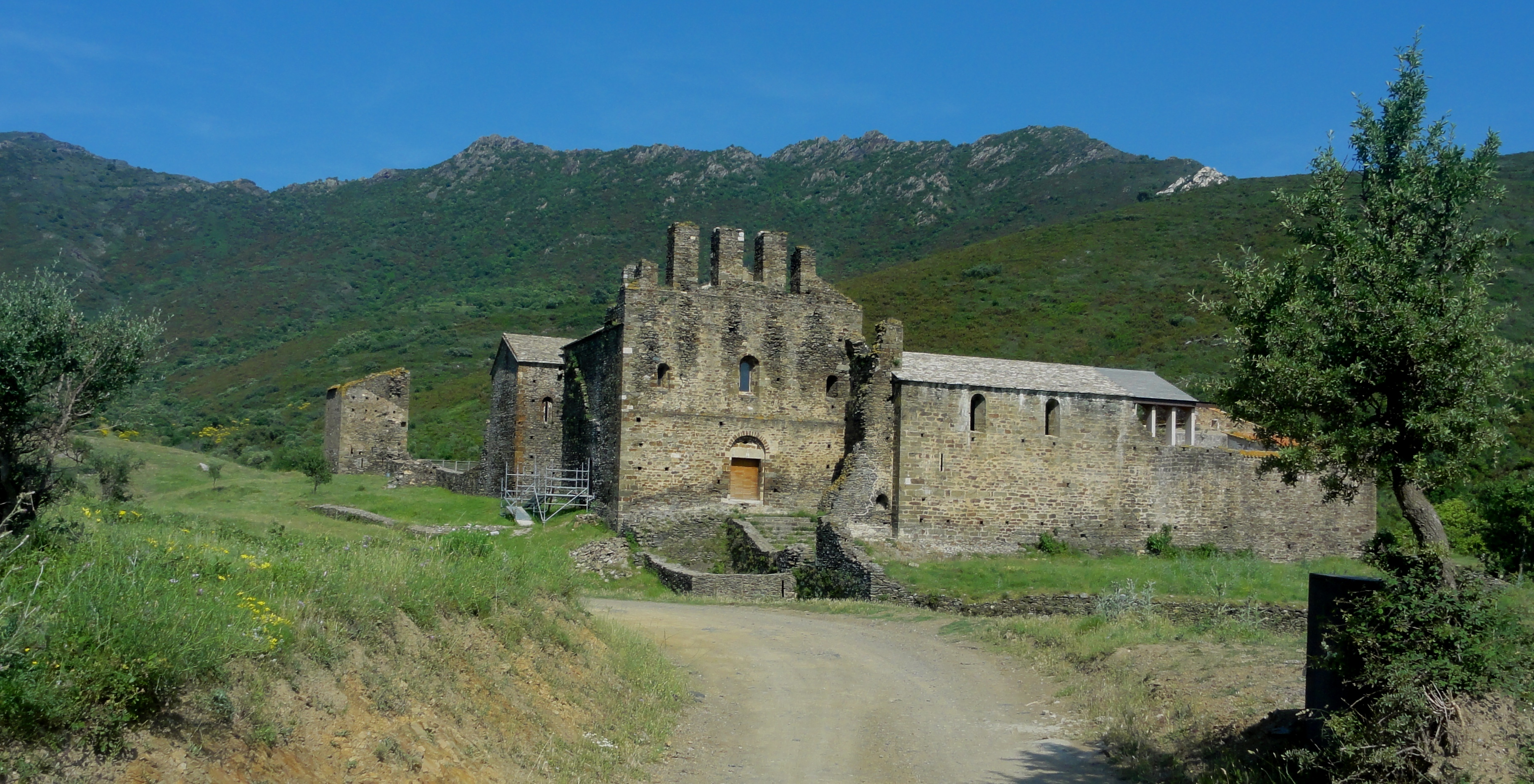 Massís de l'Albera (Alt Empordà) This is a a photo of a natural area in Catalonia, Spain, with id: ES510127